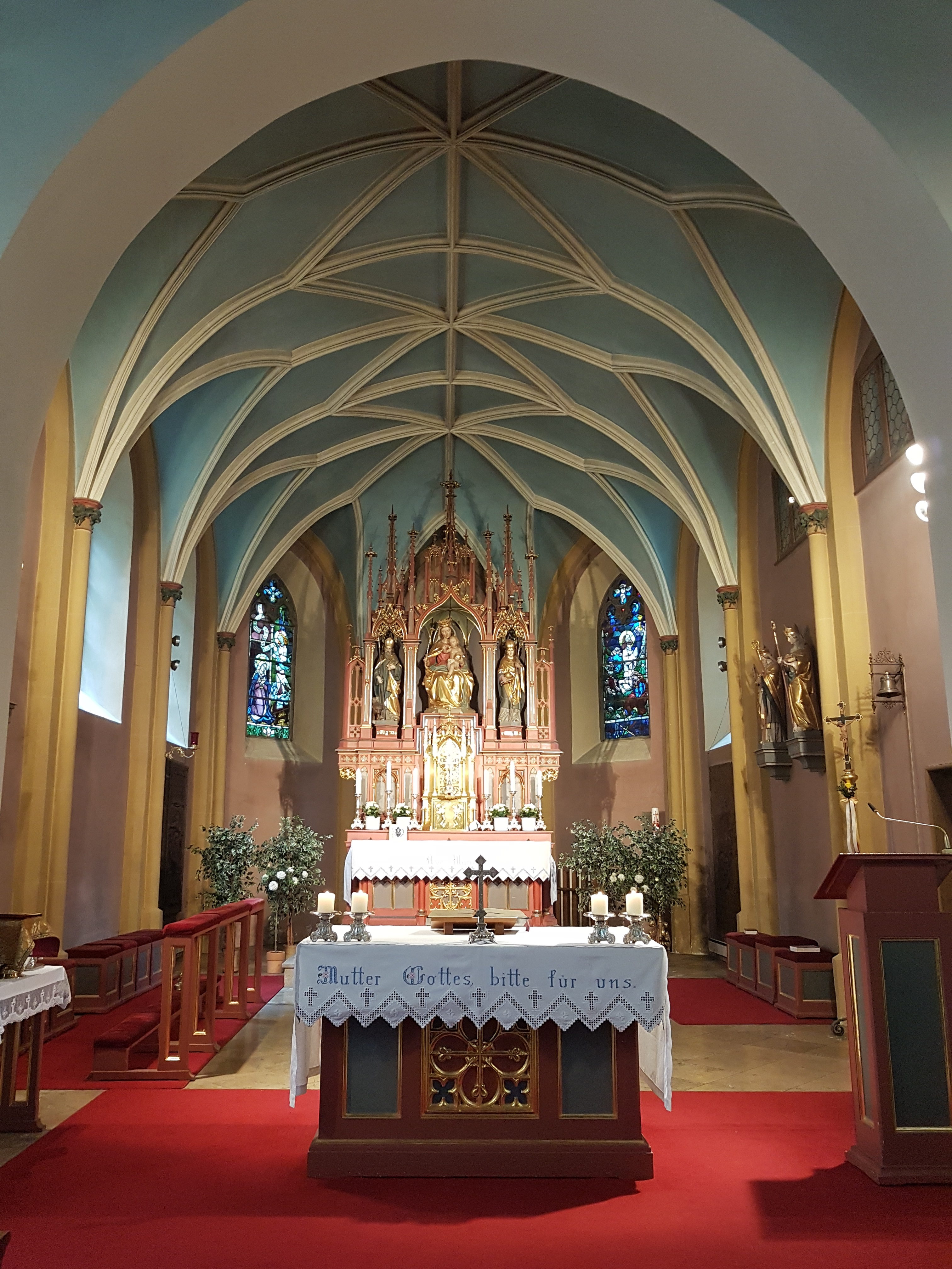 München-Pasing, Mariä Geburt, Chor (Gesamtansicht)